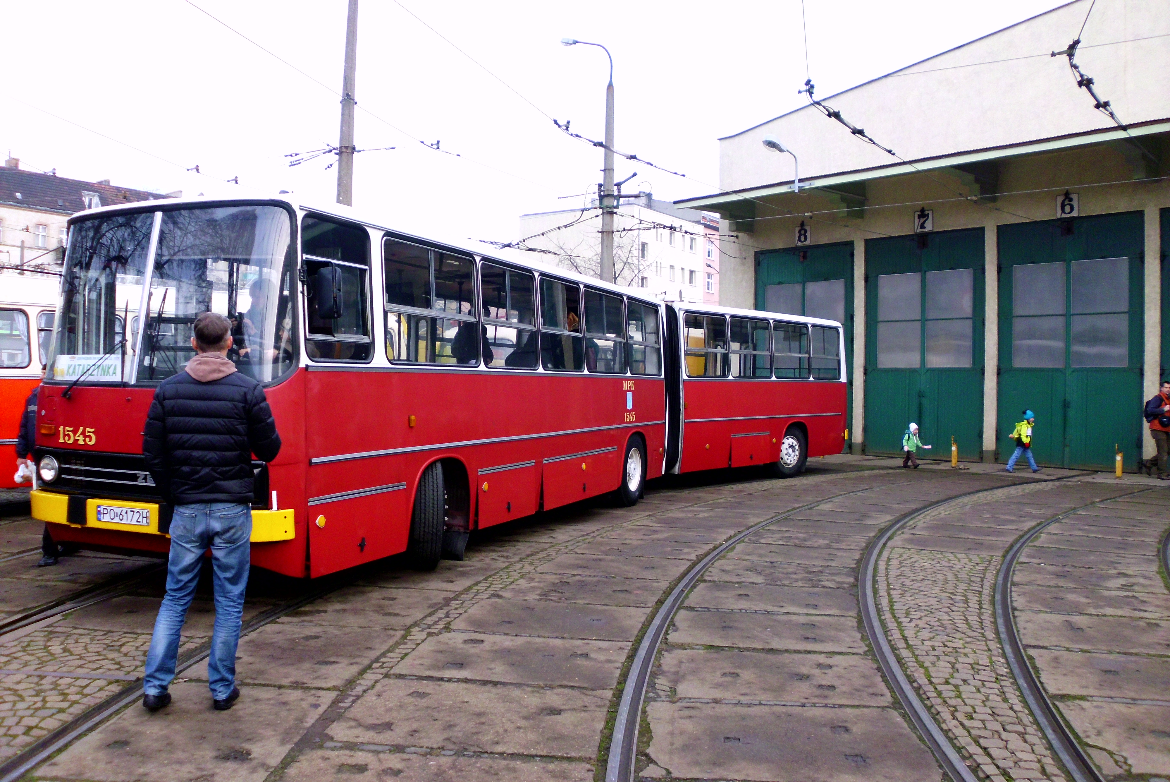 Ikarus 280 - Katarzynka 2014